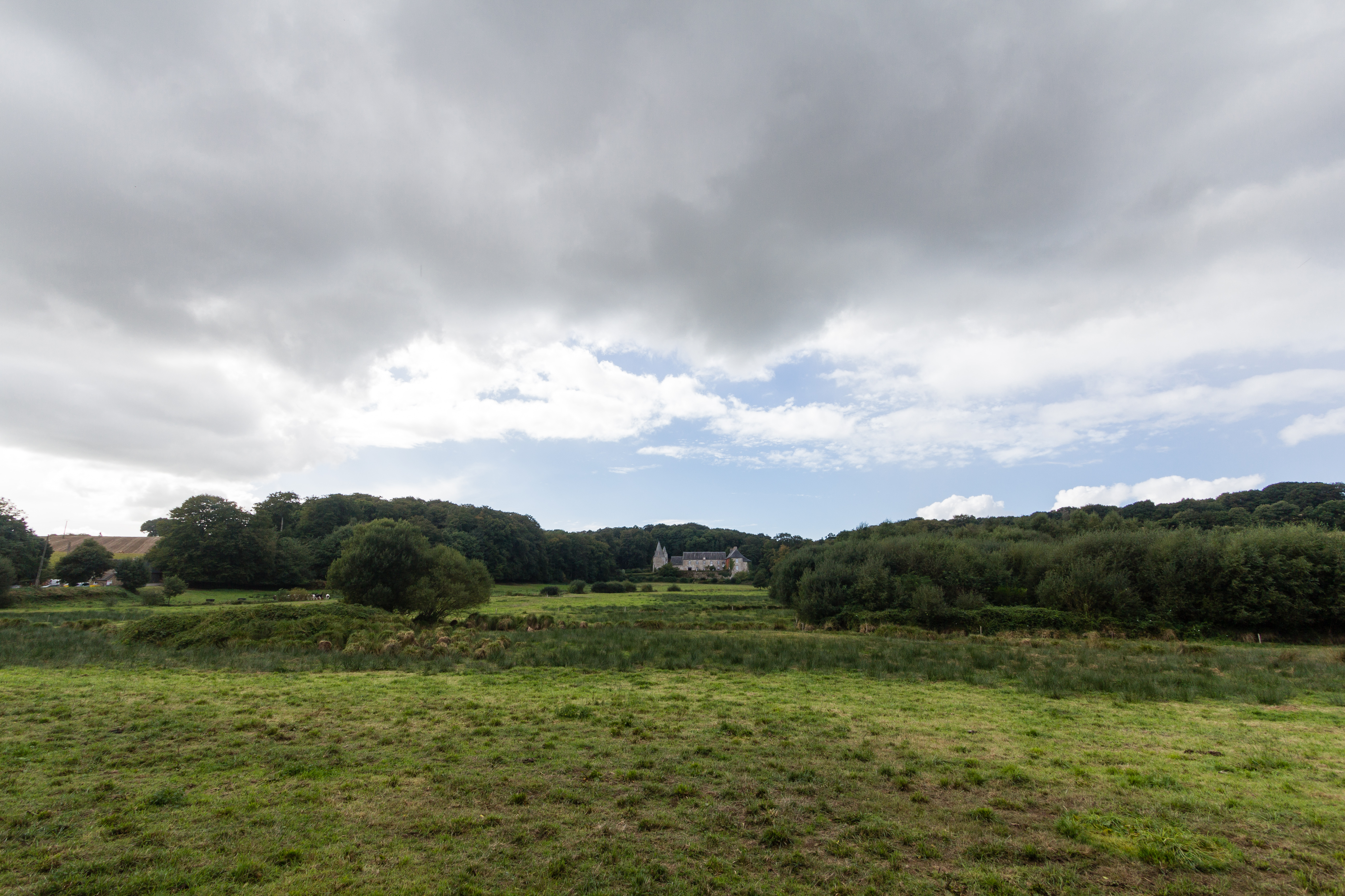 Manoir de la Noë-Sèche à Le Fœil (France).